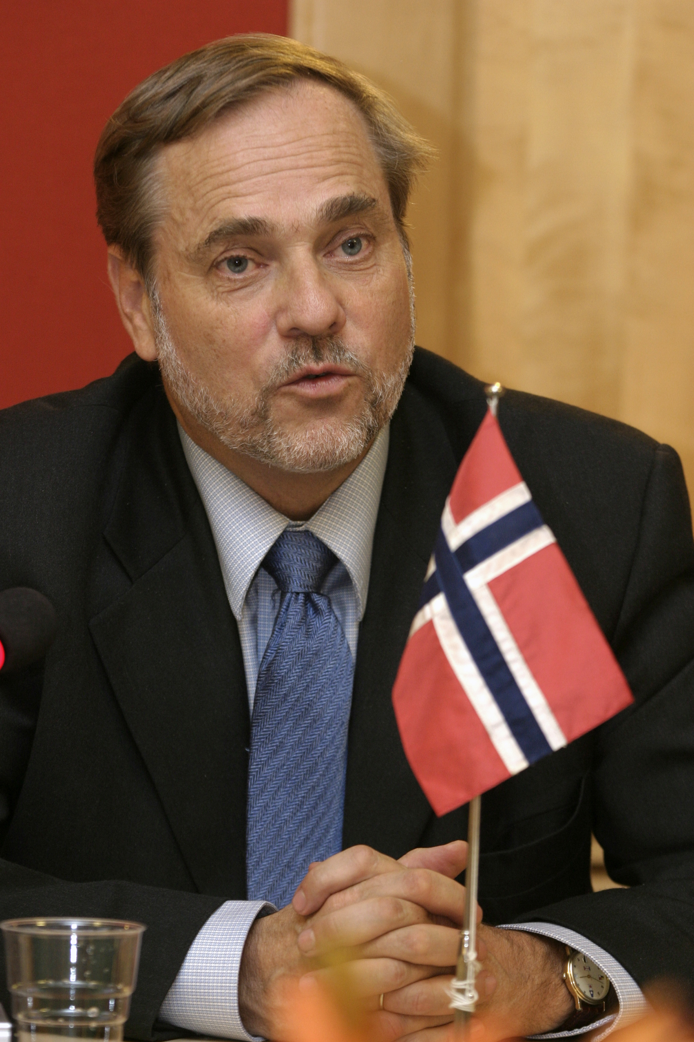 Jan Petersen, utrikesminister, Norge (Bilden är tagen vid Nordiska rådets session i Oslo, 2003)